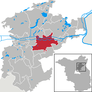 Eberswalde in Brandenburg (Country) - District Barnim